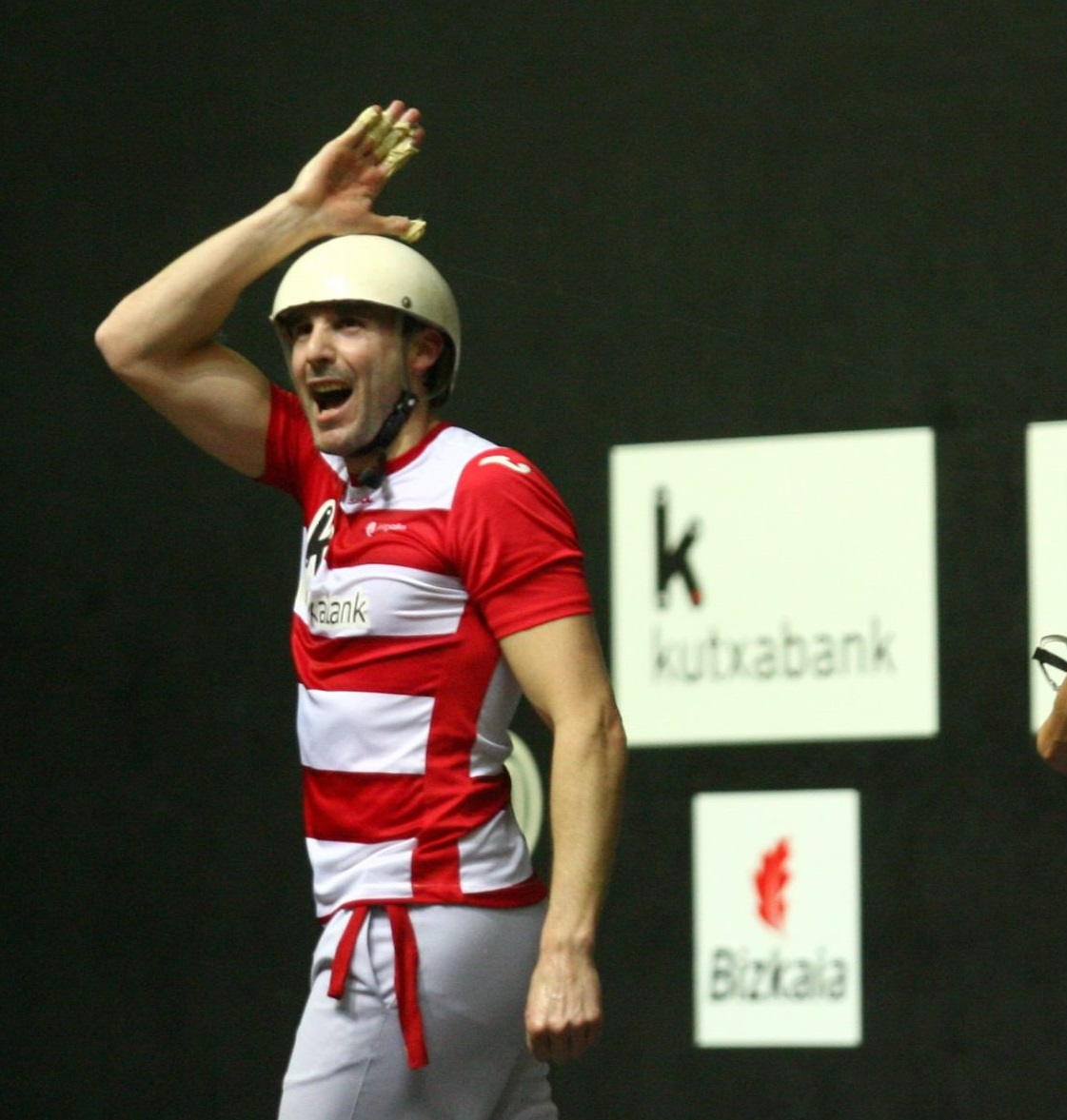 Esteban Gaubeka "El Gallo de Armintza" emulando a un gallo tras ganar la Liga de Parejas 2016 en el frontón Bizkaia de Bilbao.